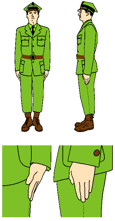 Postawa zasadnicza (bez broni) w Wojsku Polskim i w innych polskich służbach mundurowych